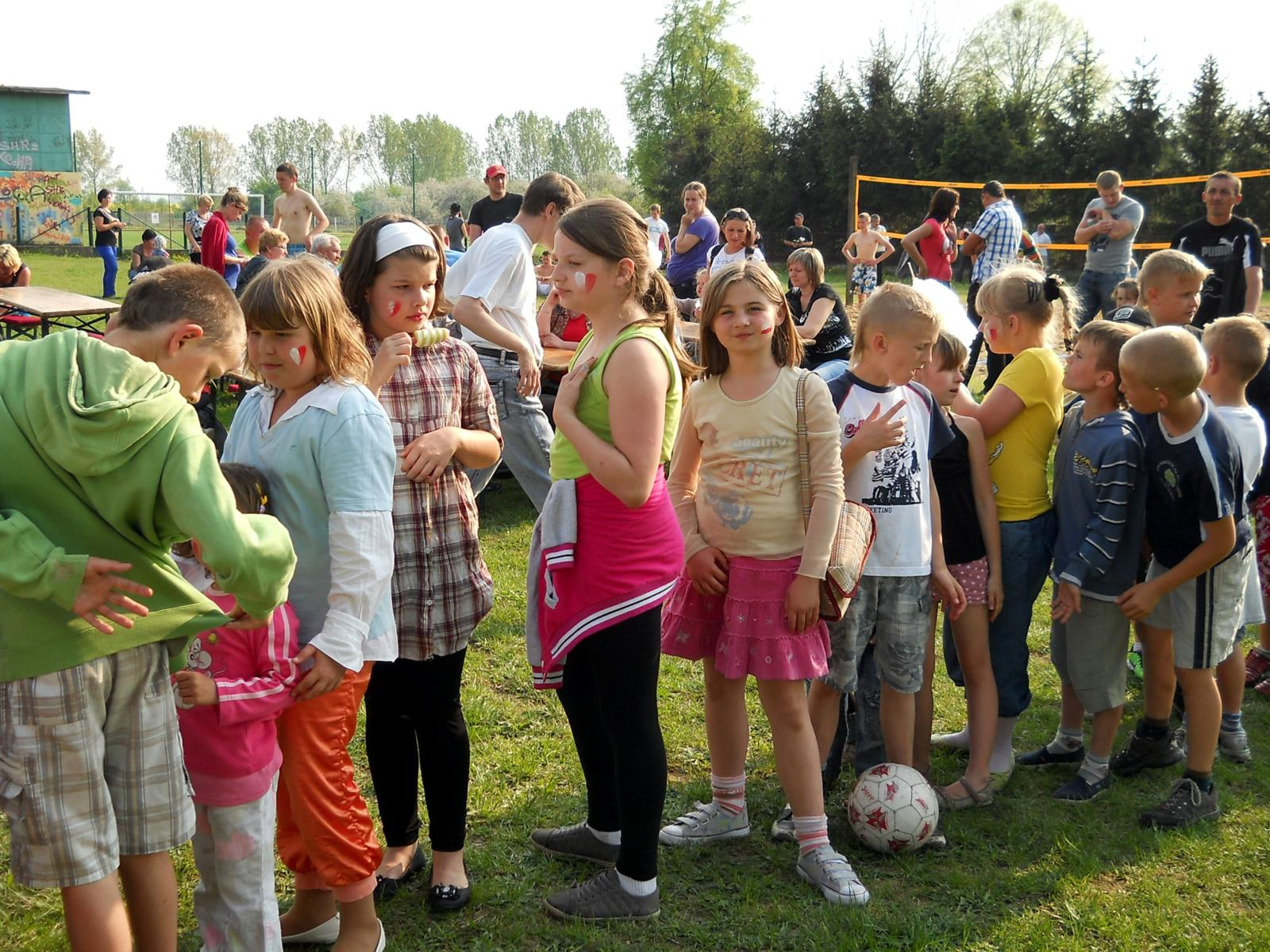 Wojcieszyce. Dzieci na festynie majowym